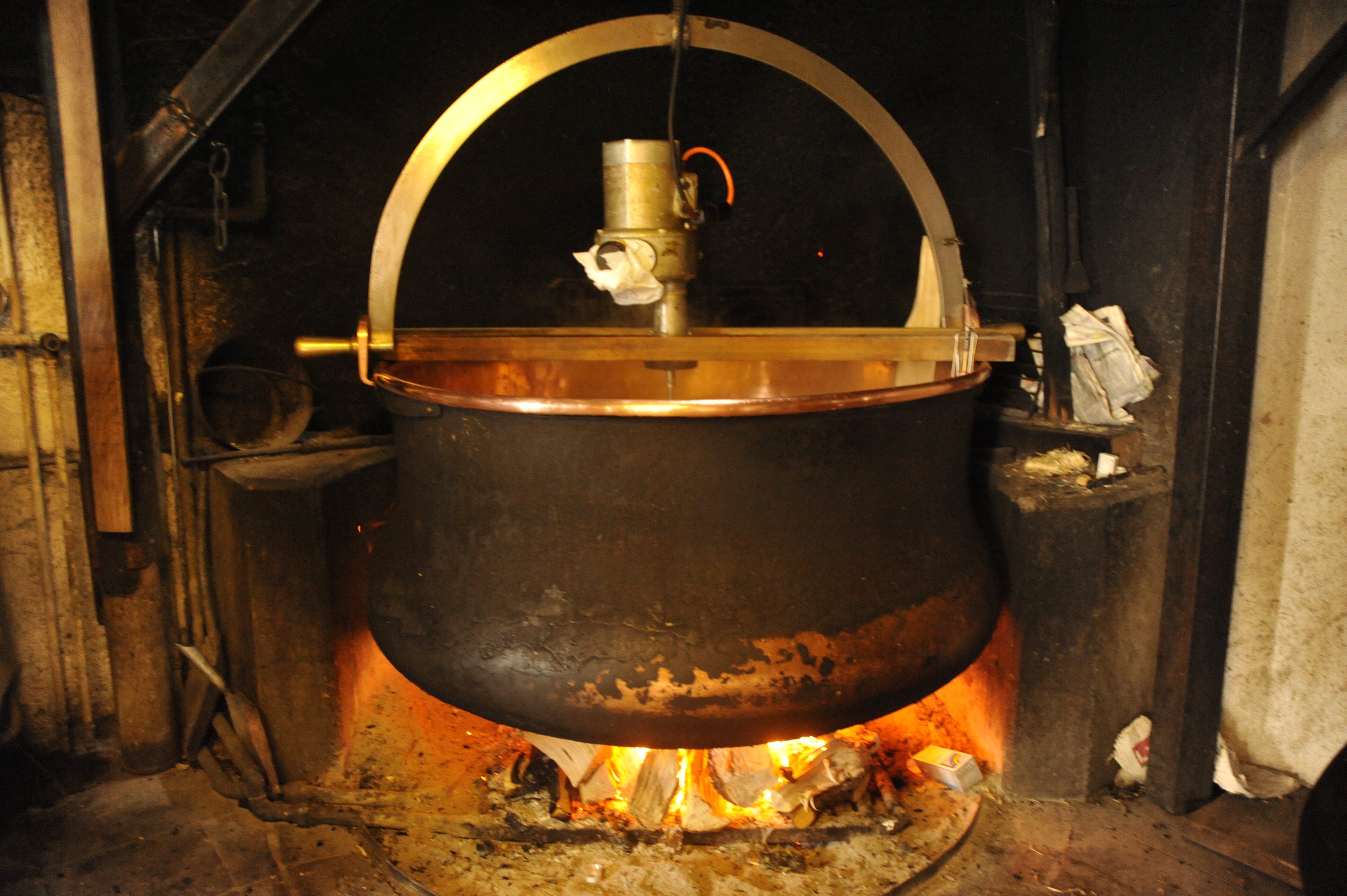 Chaudière en alpage pour la fabrication du gruyère.